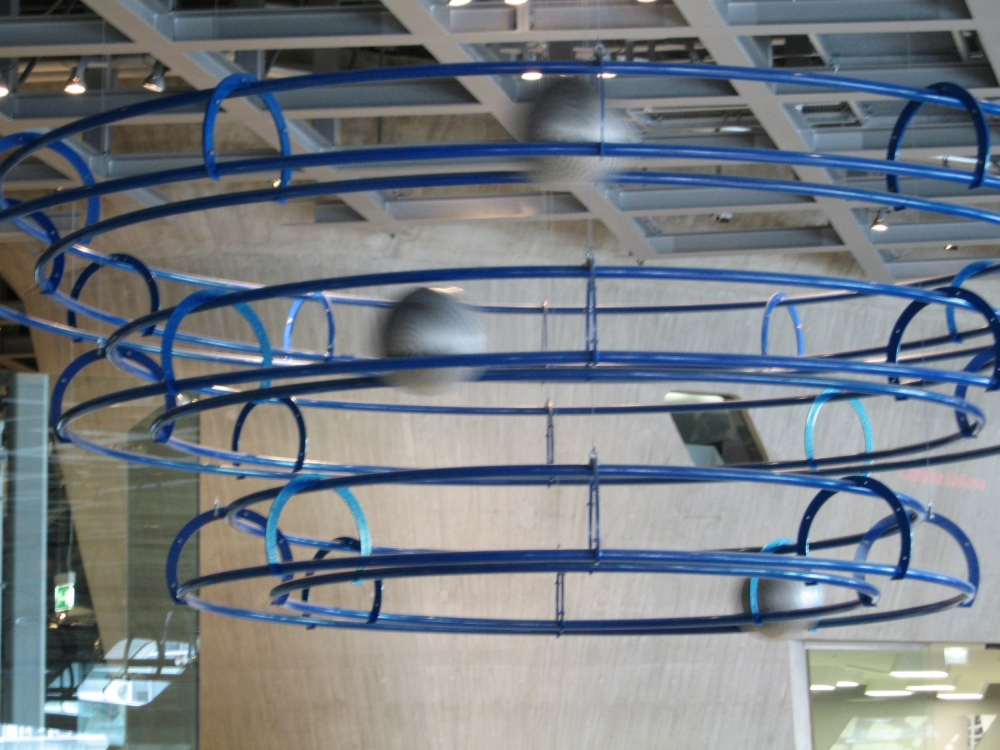 Installation im Eingangsbereich des Phaeno in Wolfsburg, Deutschland Phaeno Science Center in Wolfsburg, Germany